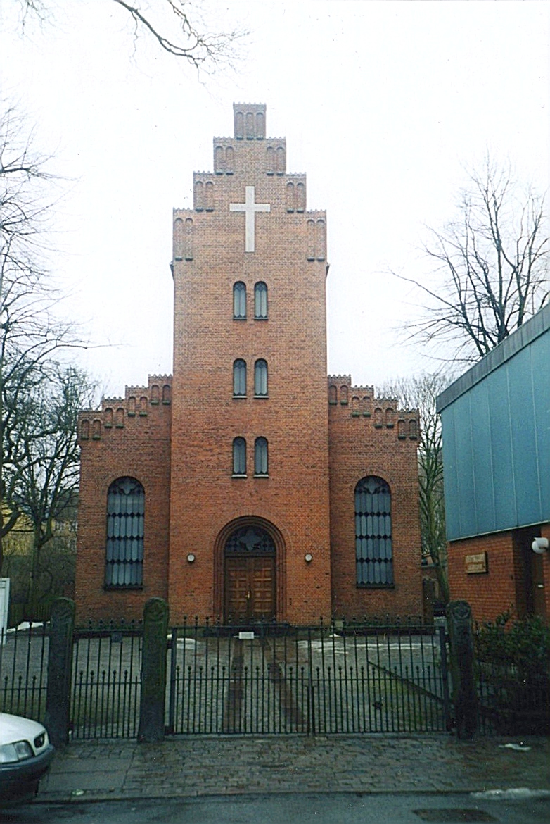 Kristuskirken (baptist), Københavns Kommune